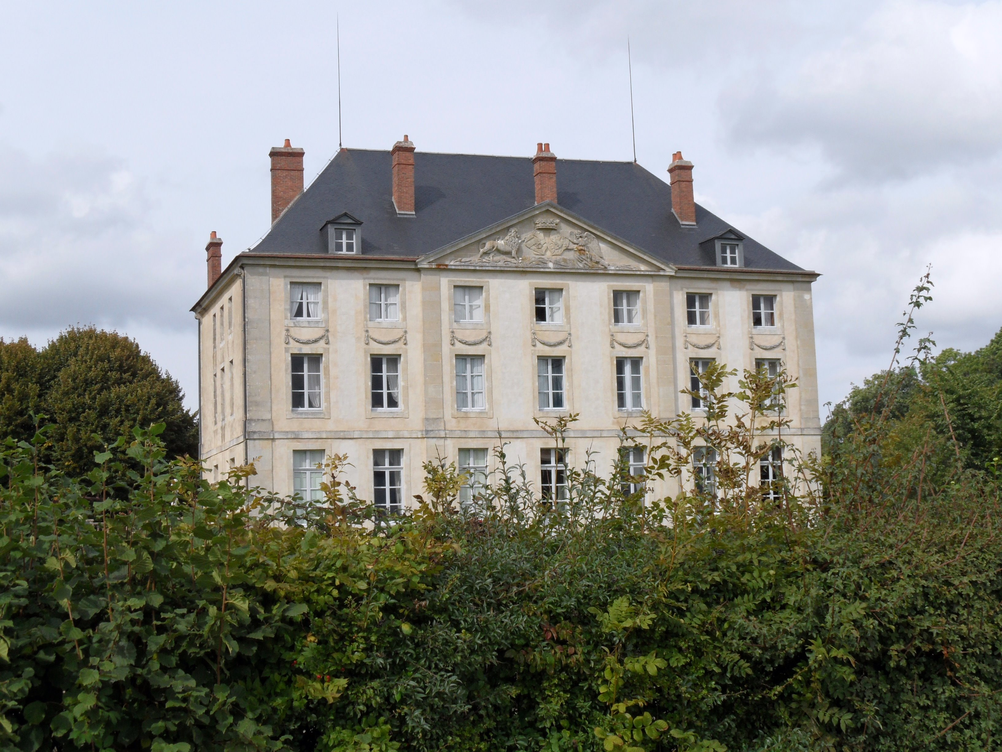 Château de Montjalin, commune de Sauvigny le Bois, Yonne